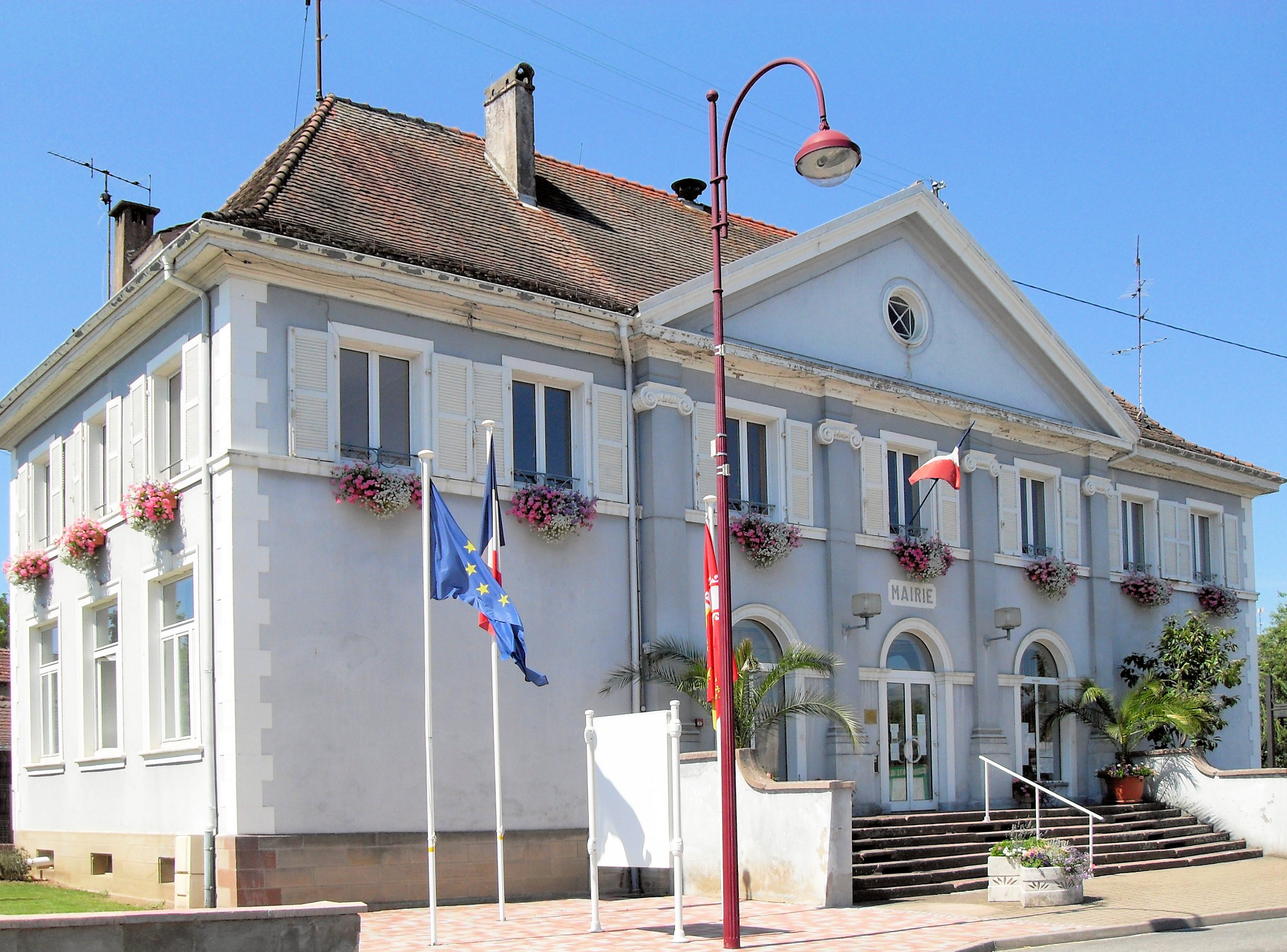 La mairie d'Aspach-le-Bas